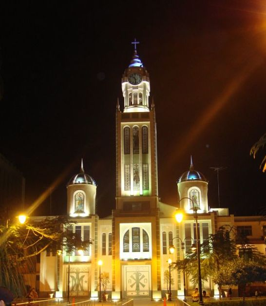 Machala (Church)